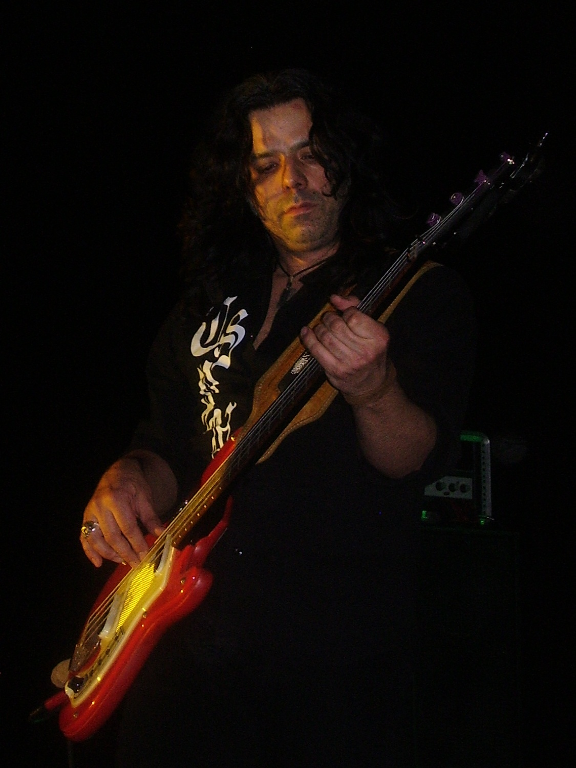 Paweł Mąciwoda, koncert 2010-02-26 Nowa Dęba